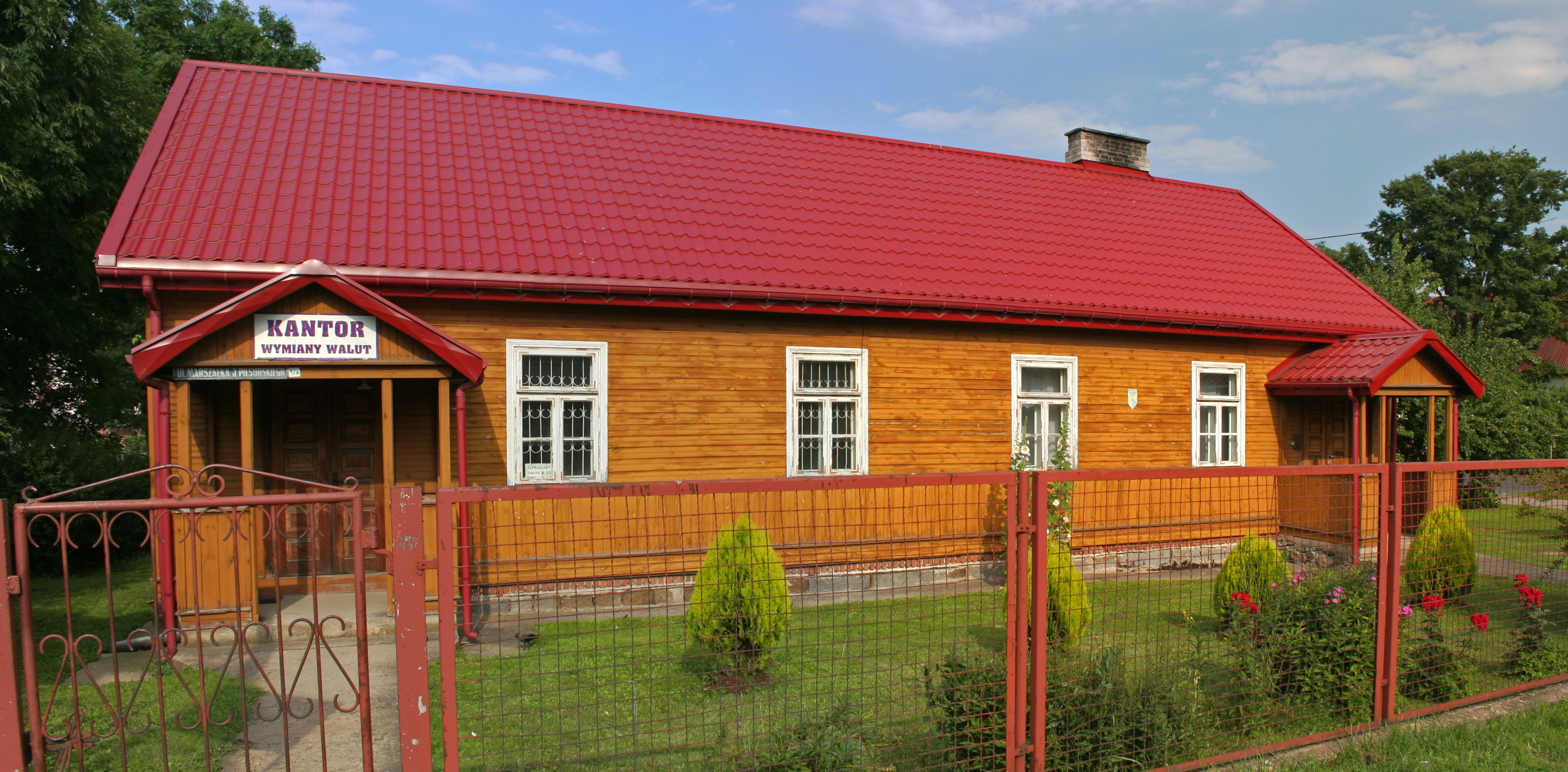 Dom w Sokółce.